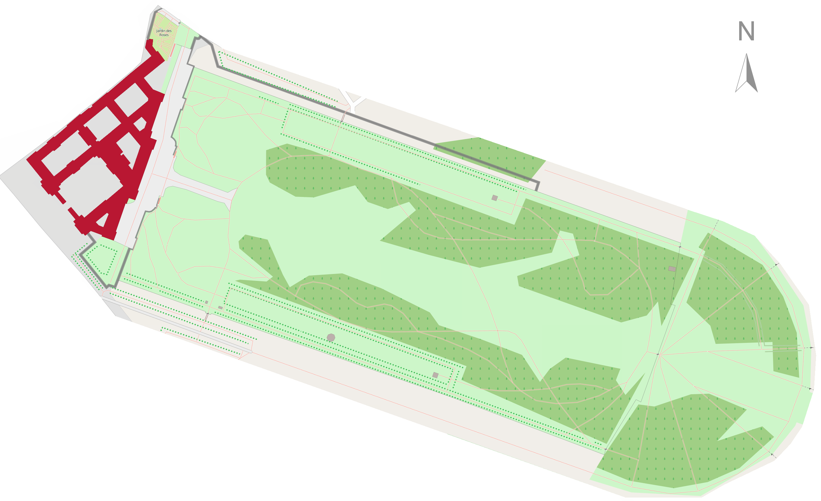 Lageplan des Schlosses Compiègne mit seinem Schlosspark This map may be incomplete, and may contain errors. Don't rely solely on it for navigation.